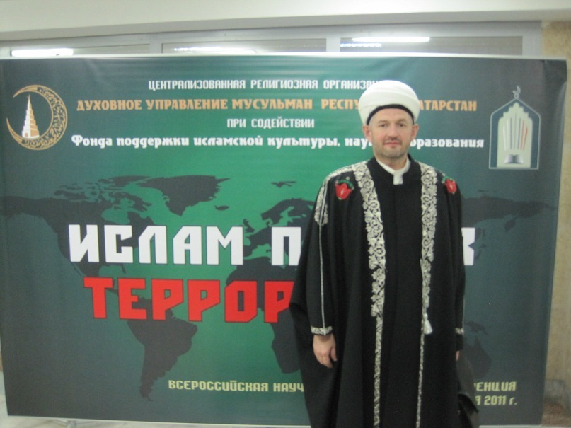 Фотография российского мусульманского деятеля Валиуллы-хазрата Якупова на конференции «Ислам против терроризма» в Казани